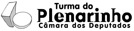 Logomarca